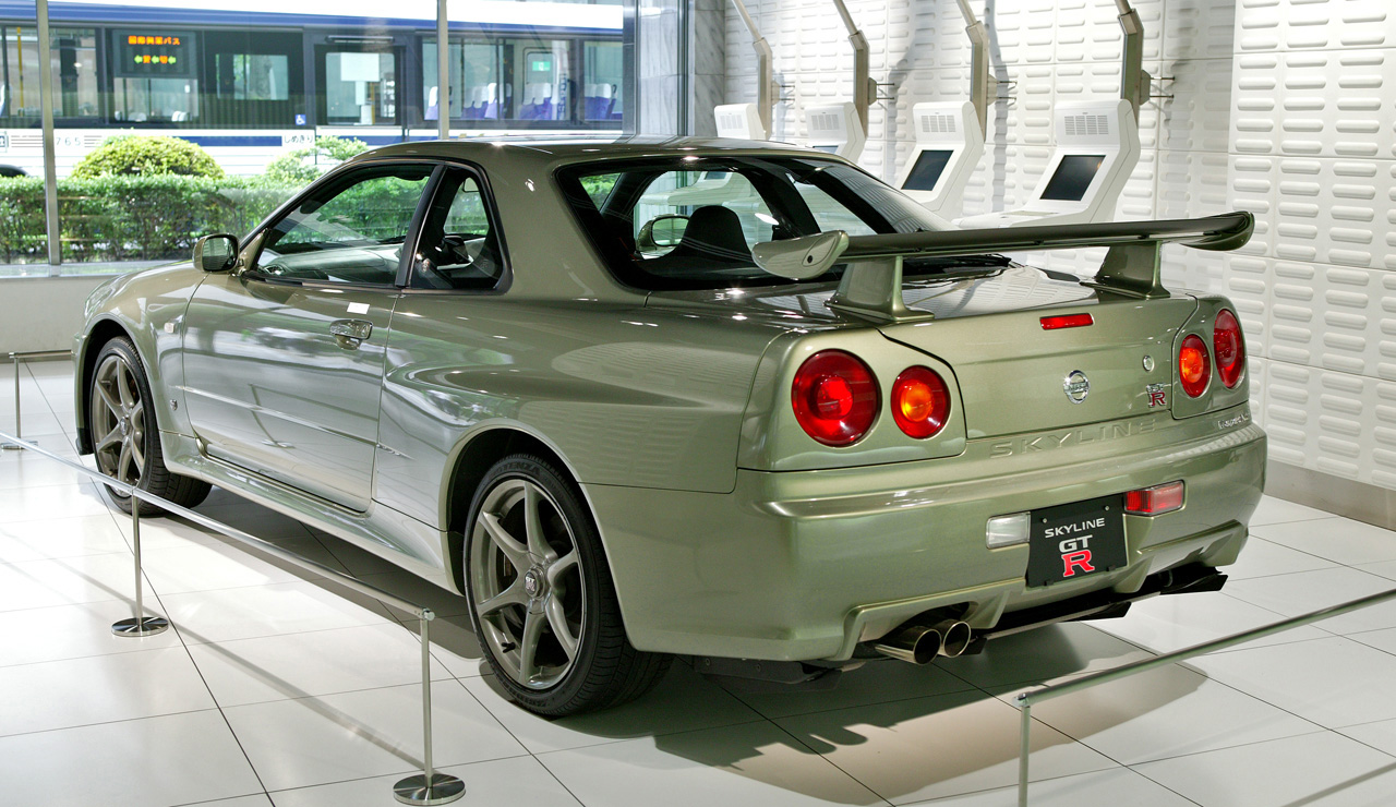 Nissan Skyline GT-R BNR34 M-Spec Nür, in the Nissan Ginza Gallery.